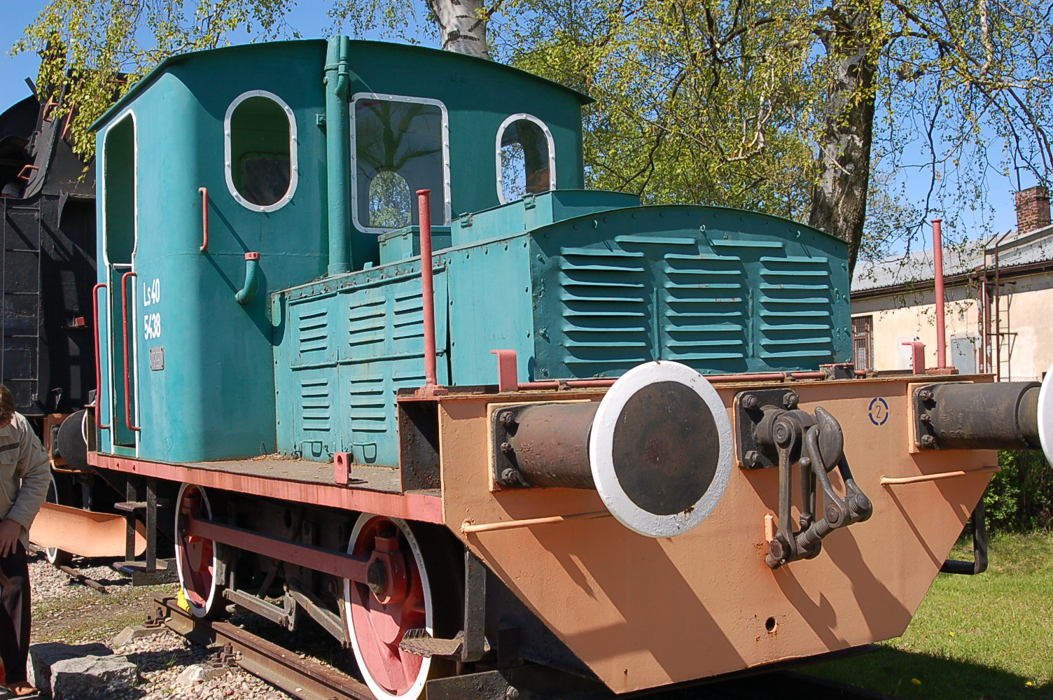 Ls40-5438 locomotive in Skansen Parowozownia Kościerzyna